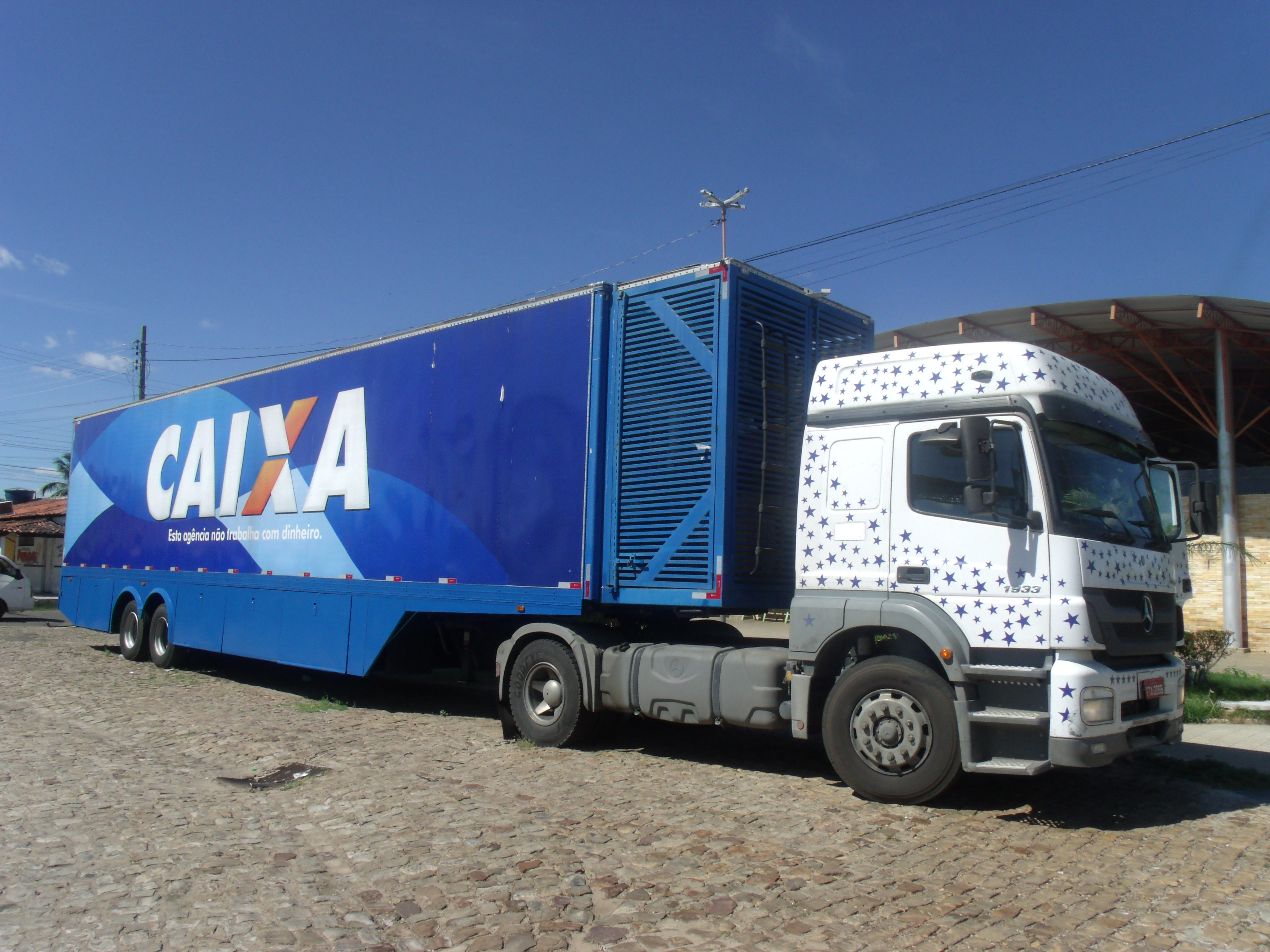 Agência móvel da Caixa Econômica Federal, usada em casos emergenciais em locais em que agencias que sofreram problemas, como explosões decorrentes de assaltos.